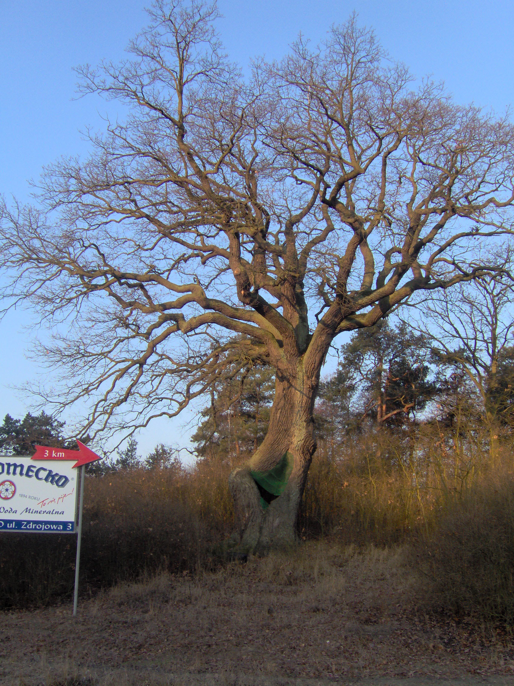 Quercus robur in Strzyżawa, natural monument